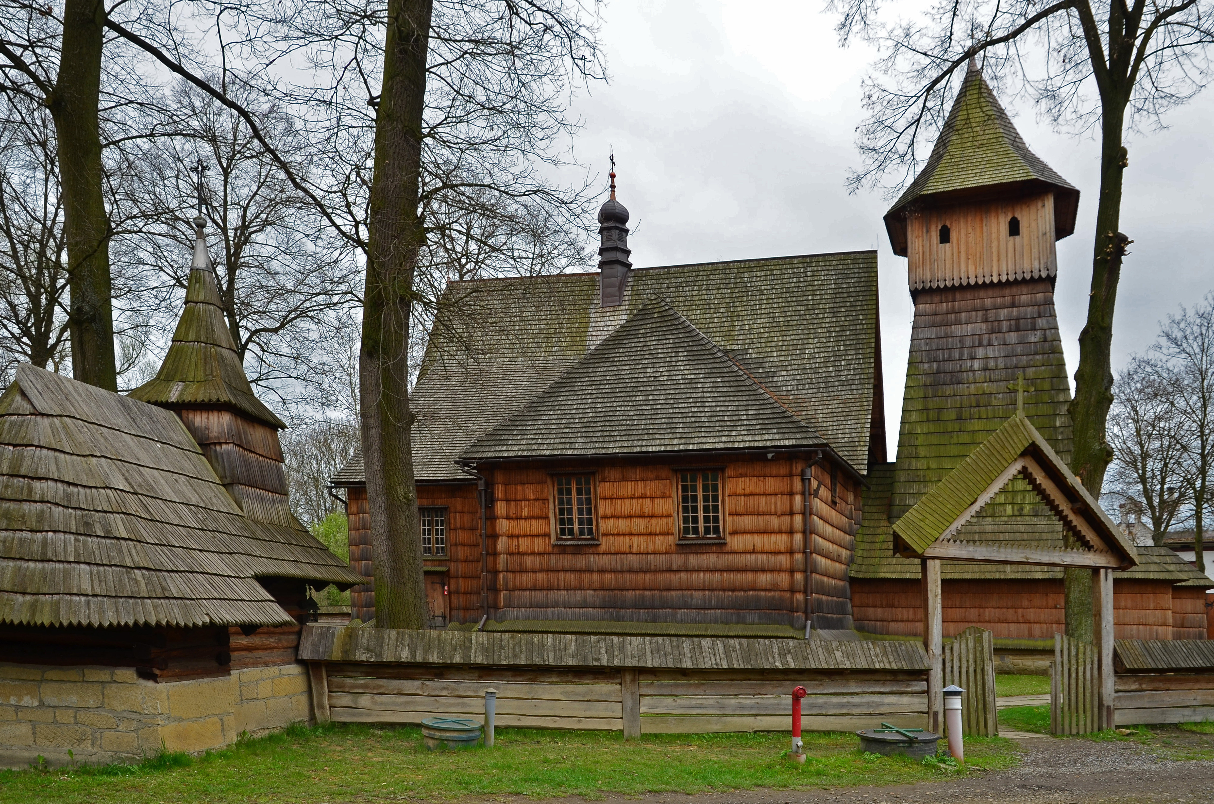 Binarowa, zespół kościoła par. p.w. św. Michała Archanioła, 1500, XIX